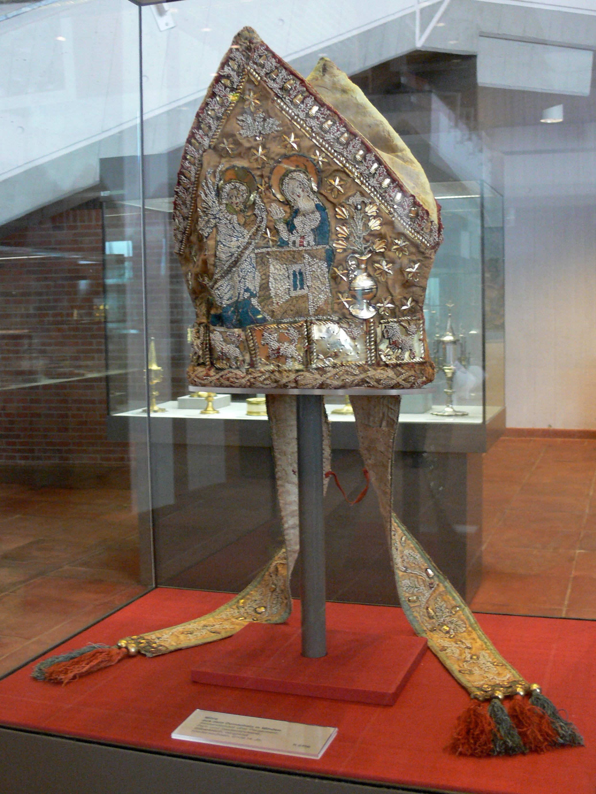 Mitra aus dem Mindener Domschatz; vermutlich Niedersachsen, Ende 14. Jh.; über ehemals rotem Seidendamast (zu gelb verblasst) Perl- und Seidenstickerei, teilweise zum Relief unterleget; Binnenzeichnungen mit Goldlahn, Applikationen aus vergoldetem Silberblech; Höhe 33 cm (eines der frühesten erhaltenen Beispiele mittelalterlicher Perlstickerei) Vorderseite mit Verkündigungsszene Kunstgewerbemuseum Berlin; Inv. Nr. K 6158